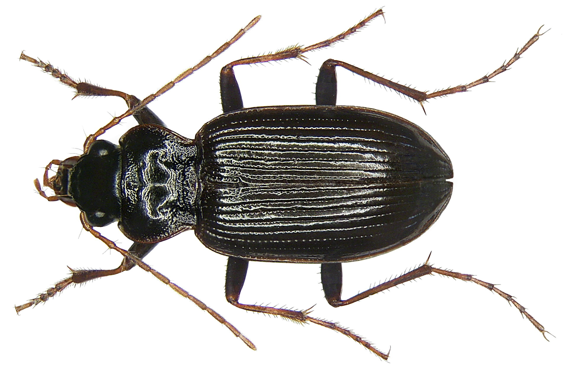 Familie: Carabidae Größe: 10-14 mm Verbreitung: Europa, Kleinasien, Kaukasus bis Kaspische Meer Ökologie: Waldart Fundort: Germania, Oberfranken, Selbitz leg.det. U.Schmidt, 2005 Foto: U.Schmidt, 2008